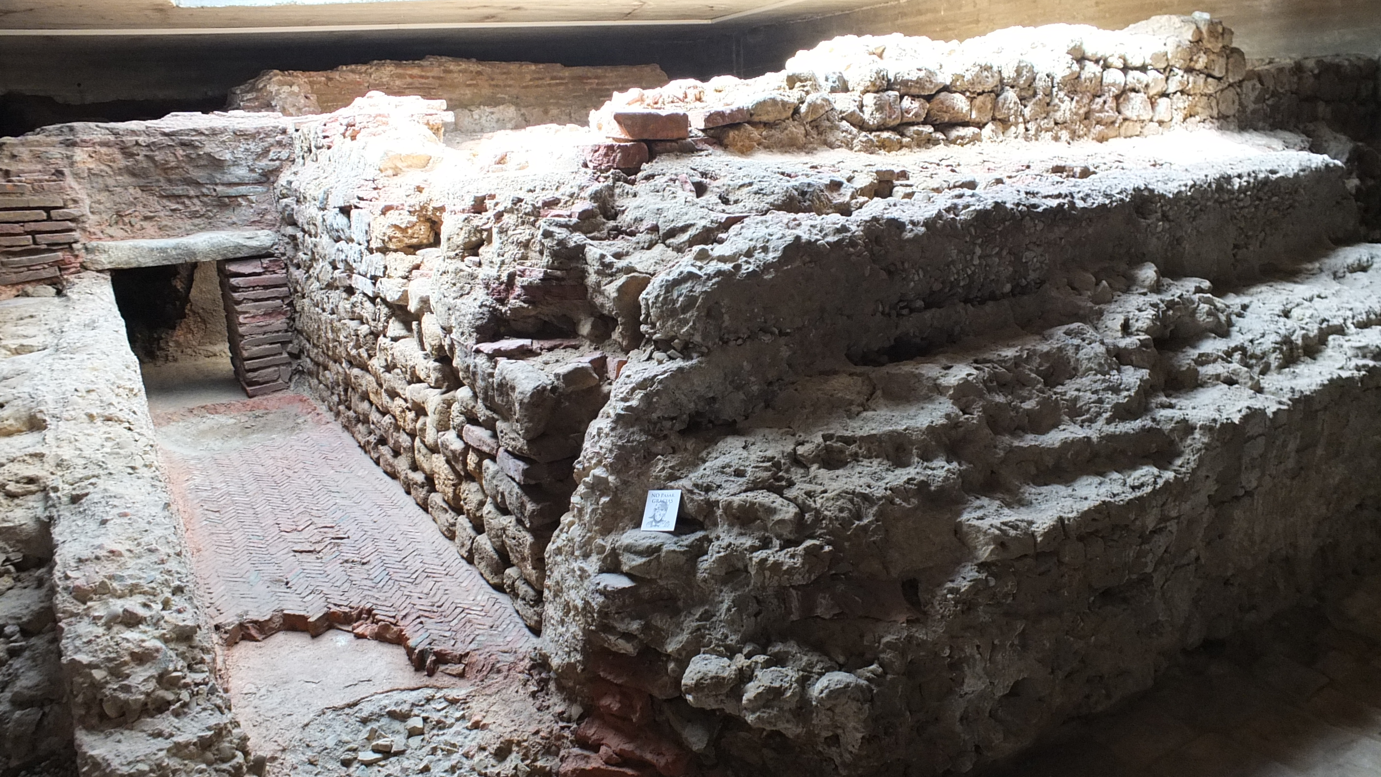 Restos de las termas de la Legio VII, concretamente de las letrinas